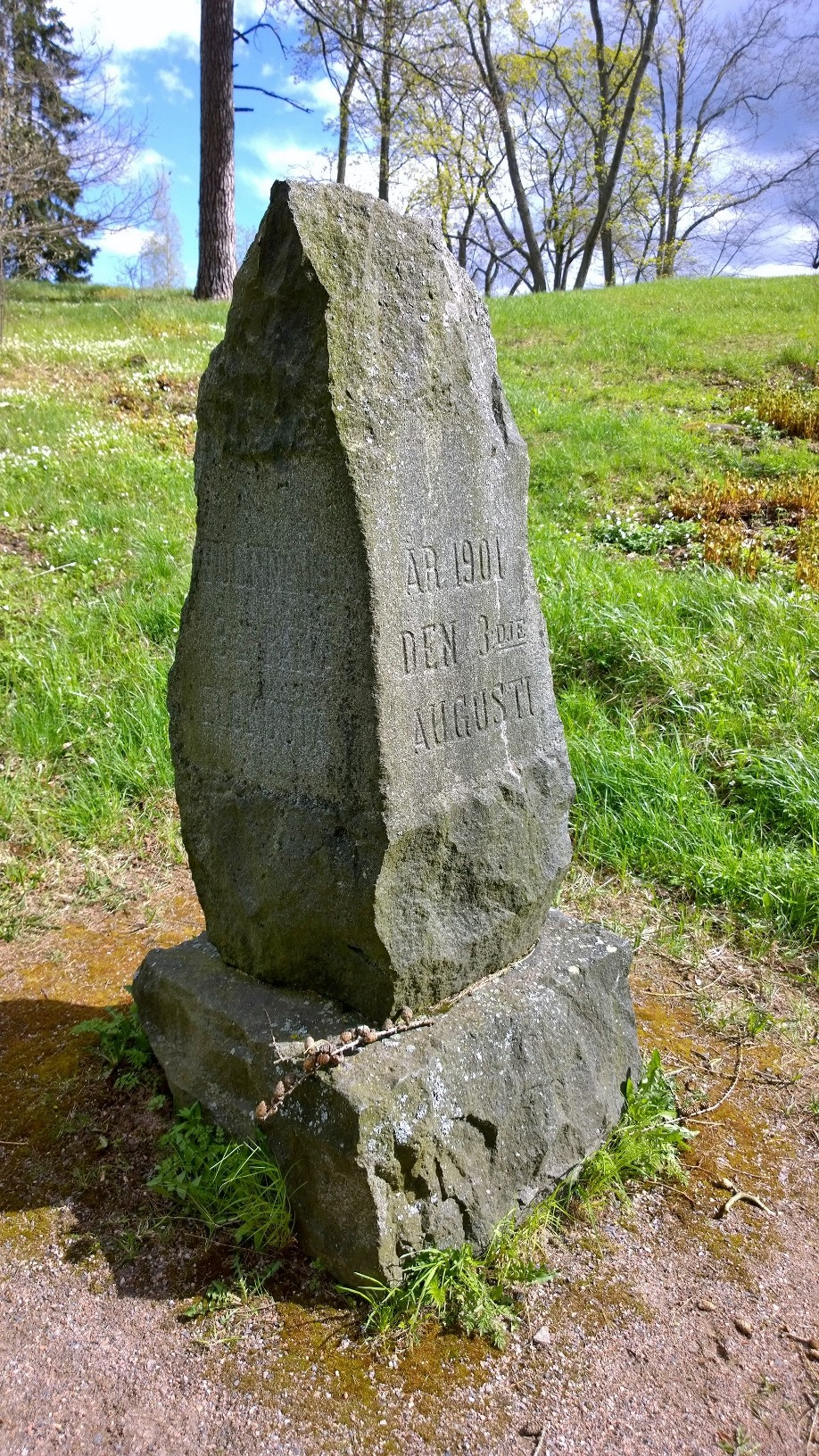 Helsingin Laajasalon Tullisaaren puistossa